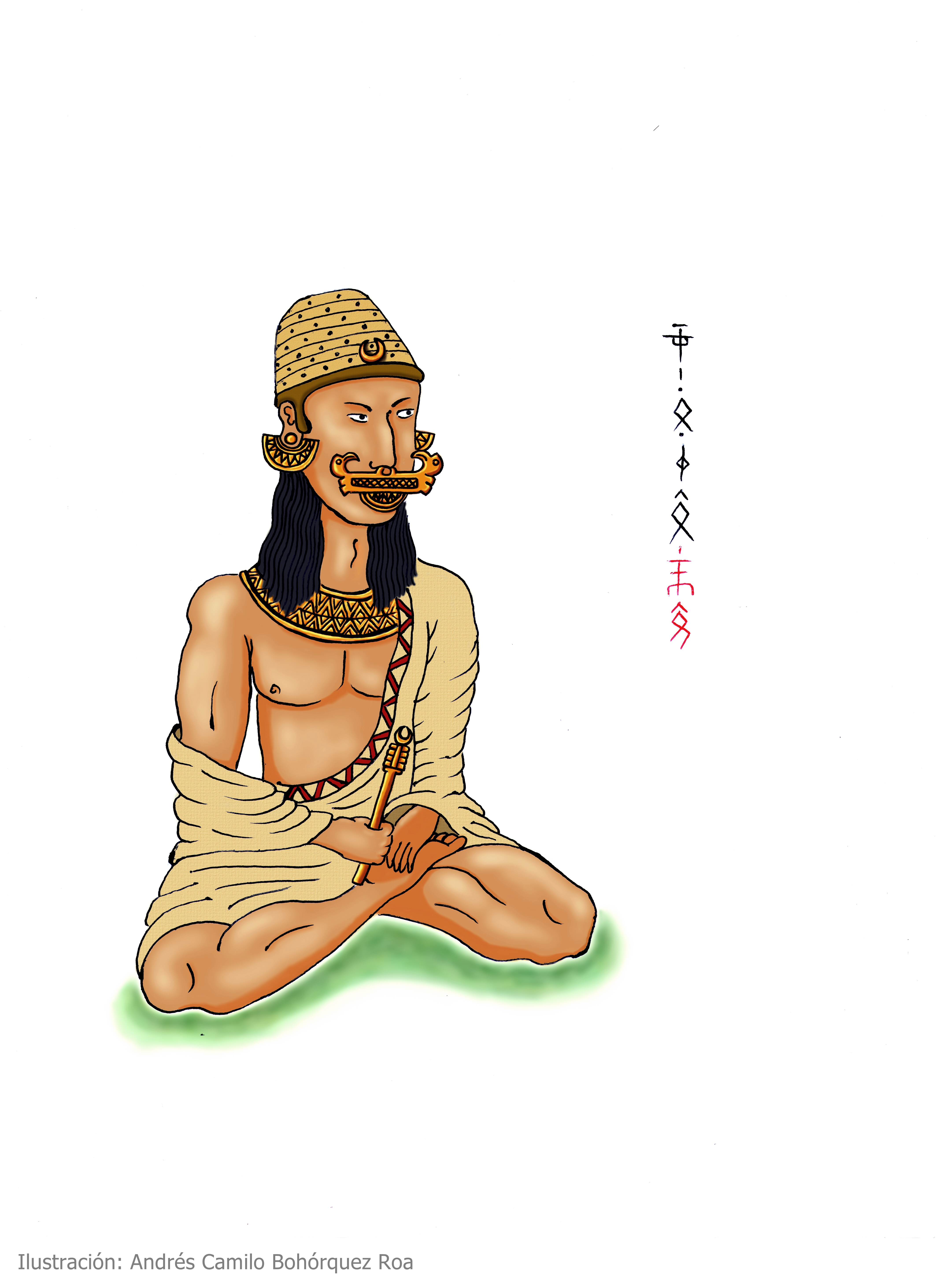 Ilustración del Zipa Meicuchuca.